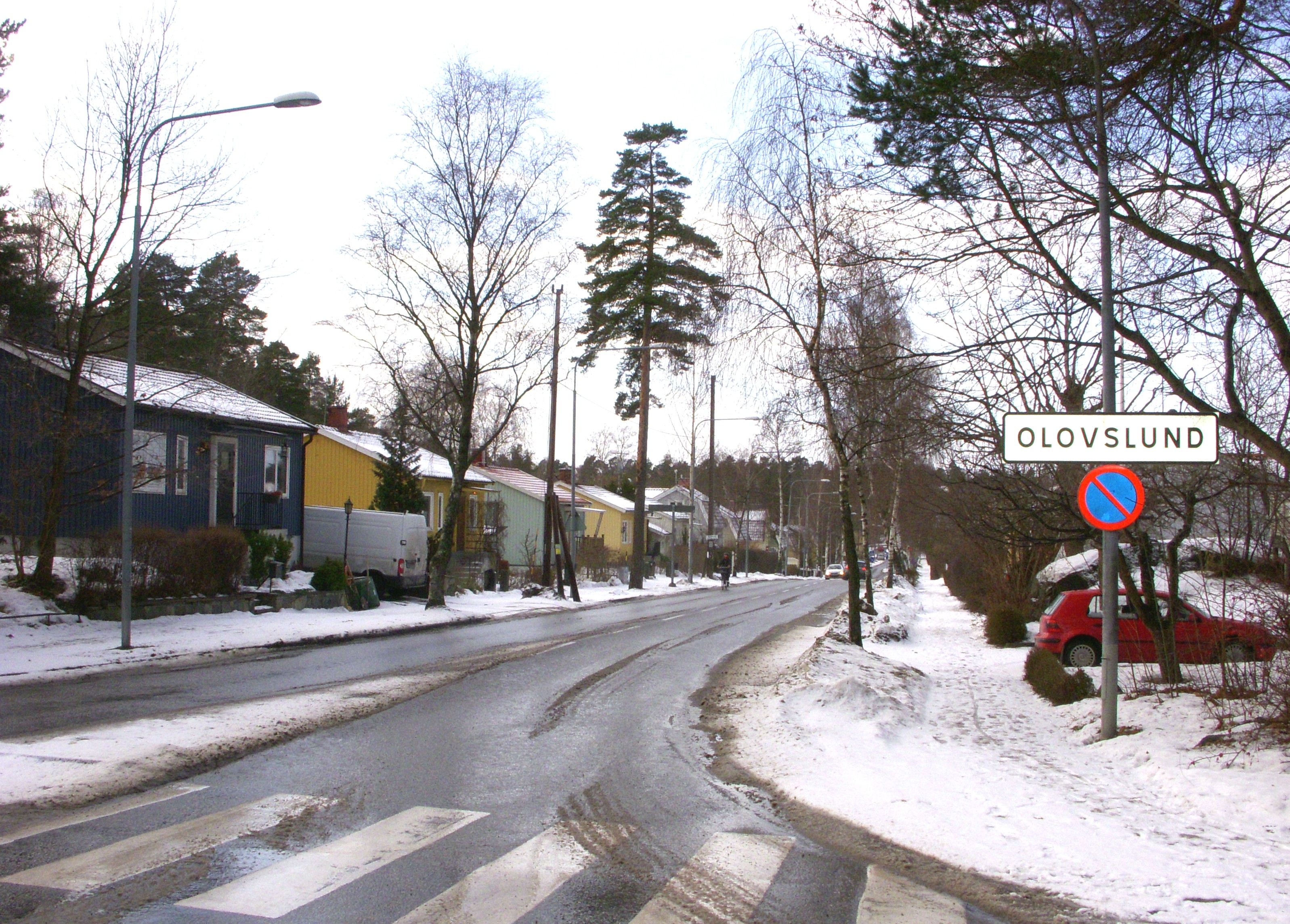 Olovslund, Bromma. Bilden tagen på Västerled med vy västerut vid korsningen Abrahamsbergsvägen i norr och Orrspelsvägen i söder. Villorna till vänster på bilden visar Västerled 151, 153 och 155.